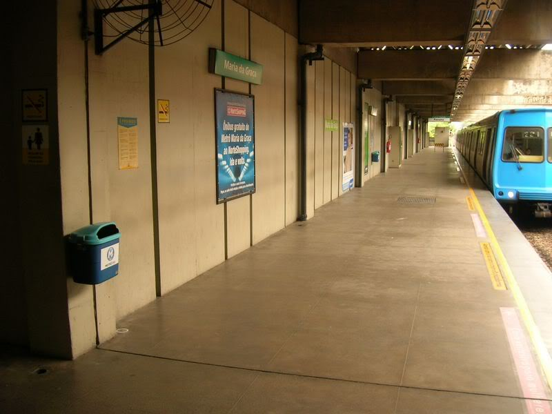 Estação Maria da Graça do Metrô Rio